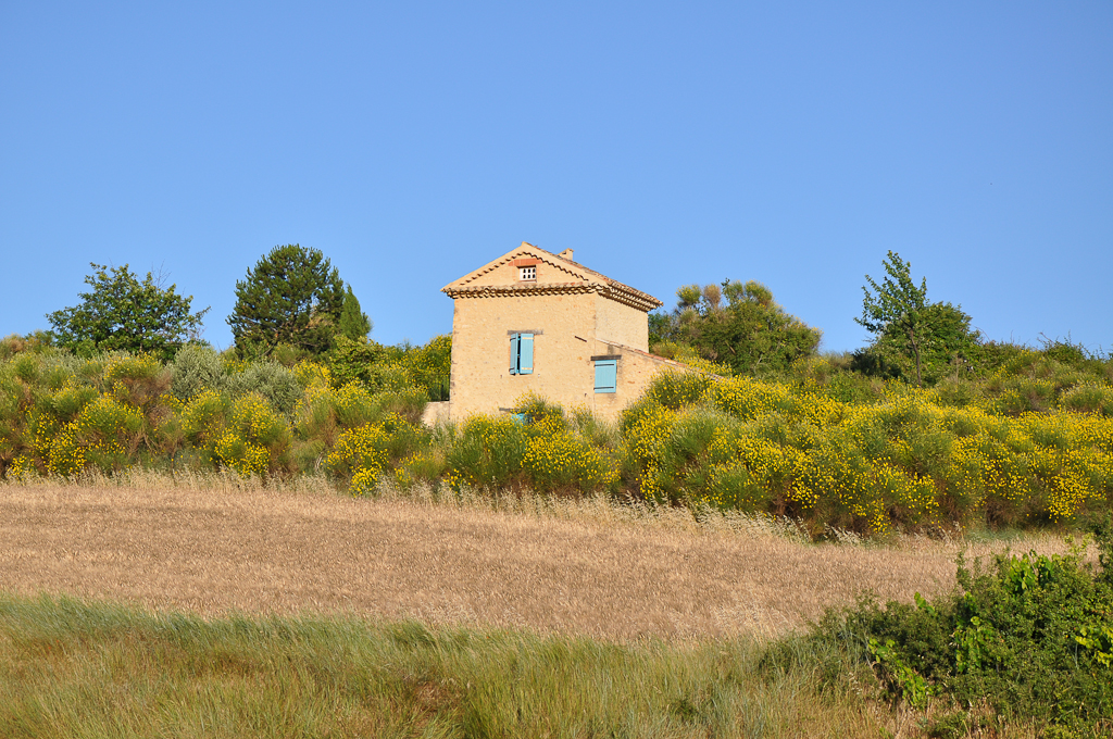 Maison à pigeonnier à Puimoisson